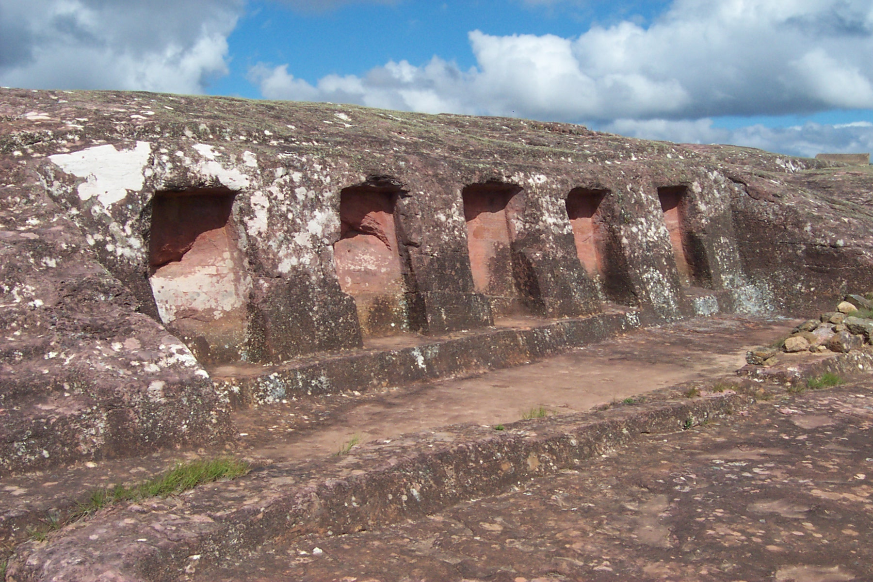 Eigen foto. Nissen in de zijwand van de monoliet El Fuerte de Samaipata; Bolivia zomer 2002.